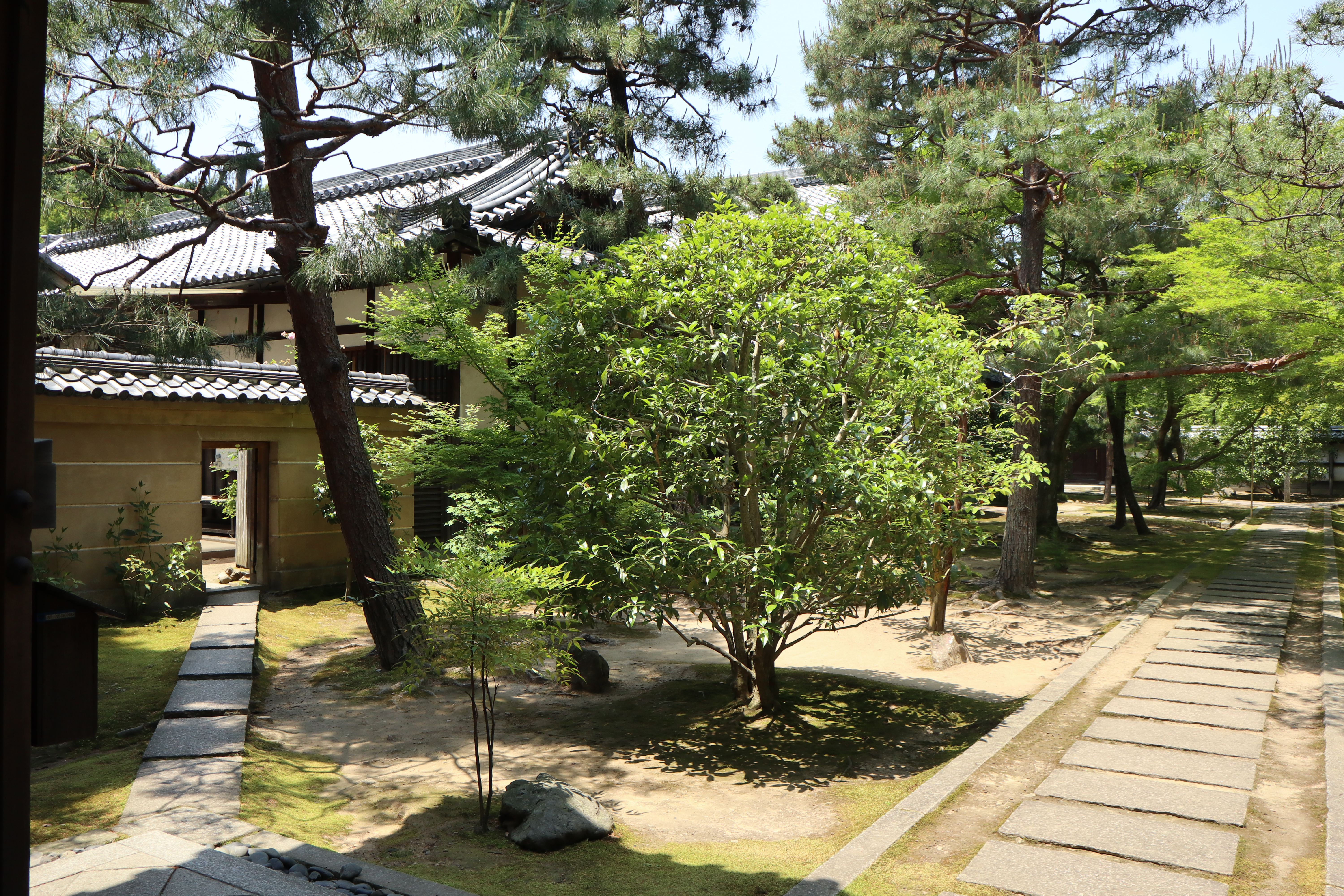 大徳寺専門道場竜翔寺